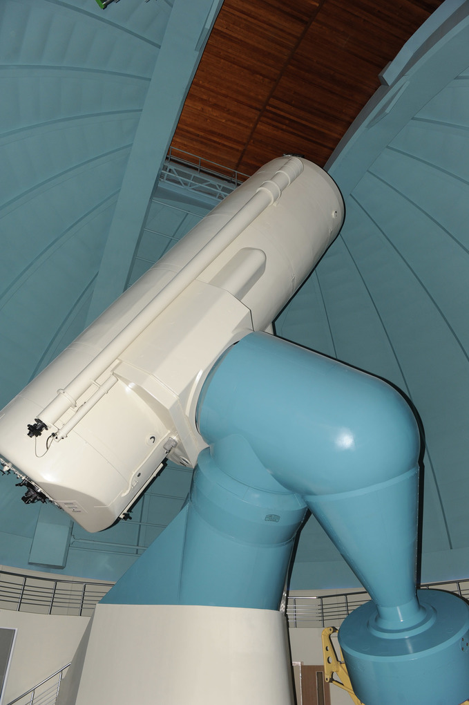 İlham Əliyev Şamaxı Astrofizika Rəsədxanasında əsaslı təmir və yenidənqurmadan sonra yaradılan şəraitlə tanış olarkən